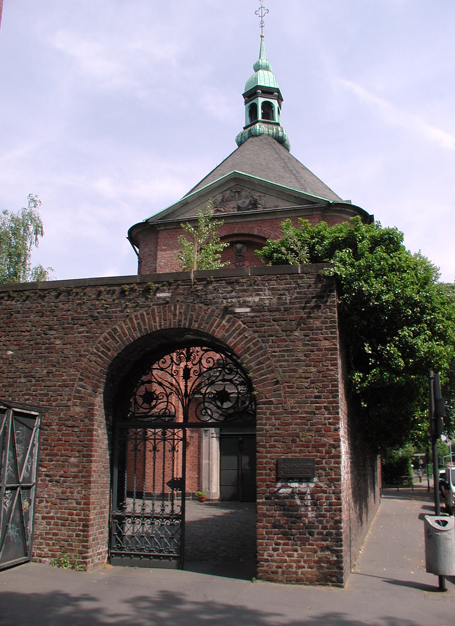 Köln, St. Gregorius Elendskirche